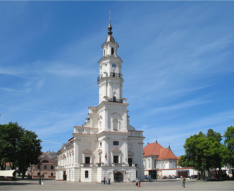 Kauno rotušė.